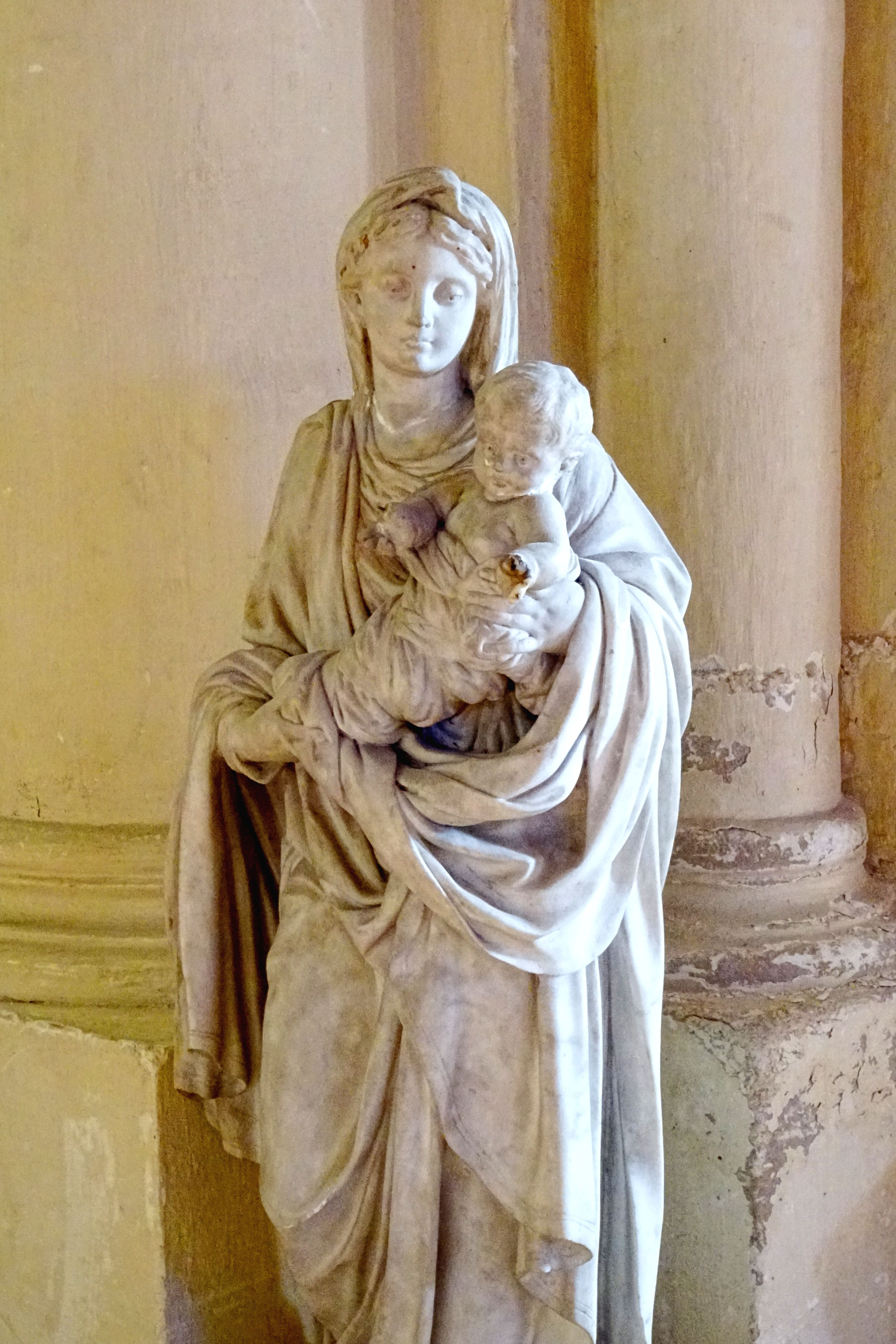 Vierge à l'Enfant en marbre, inspirée de la Renaissance italienne, première moitié XIXe siècle.